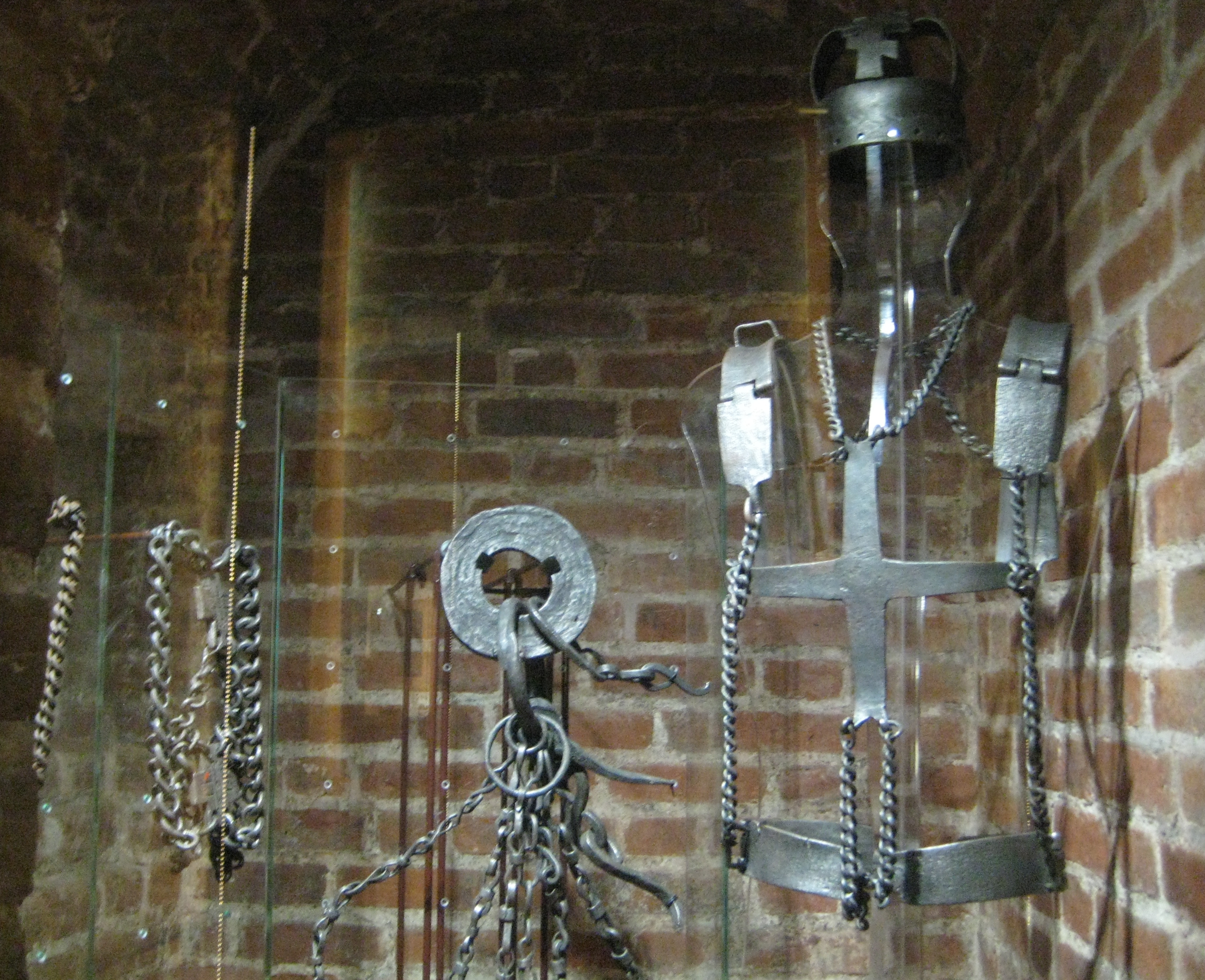 Вериги. Москва, 17 век. Железо, ковка, гравировка. Предположительно венец, верижный крест и пояс принадлежали св. Иоанну Блаженному по прозвищу "Большой Колпак".